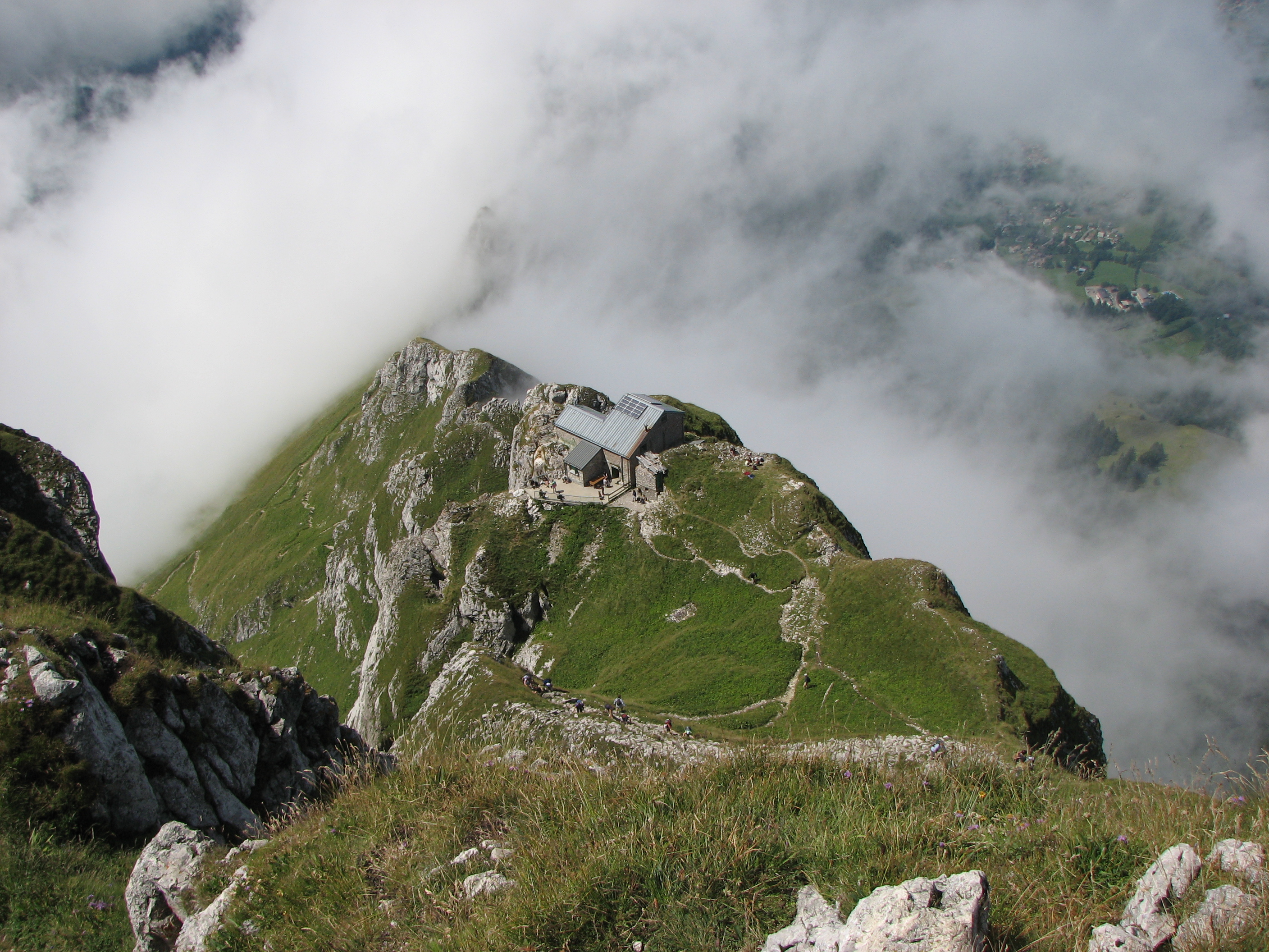 Le refuge de la Dent d'Oche quelques mètres sous le sommet